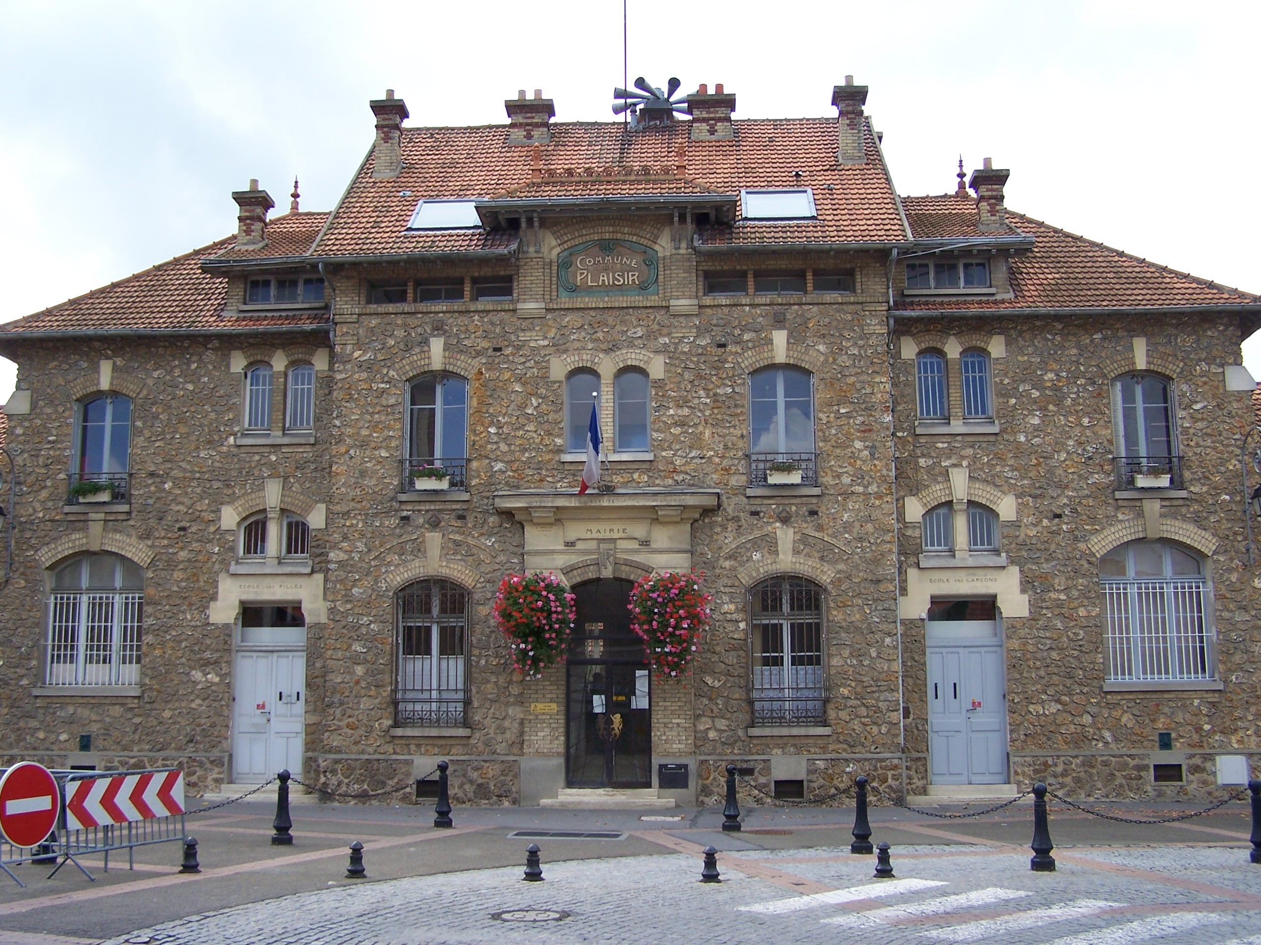 Ancienne mairie de Plaisir (Yvelines, France)